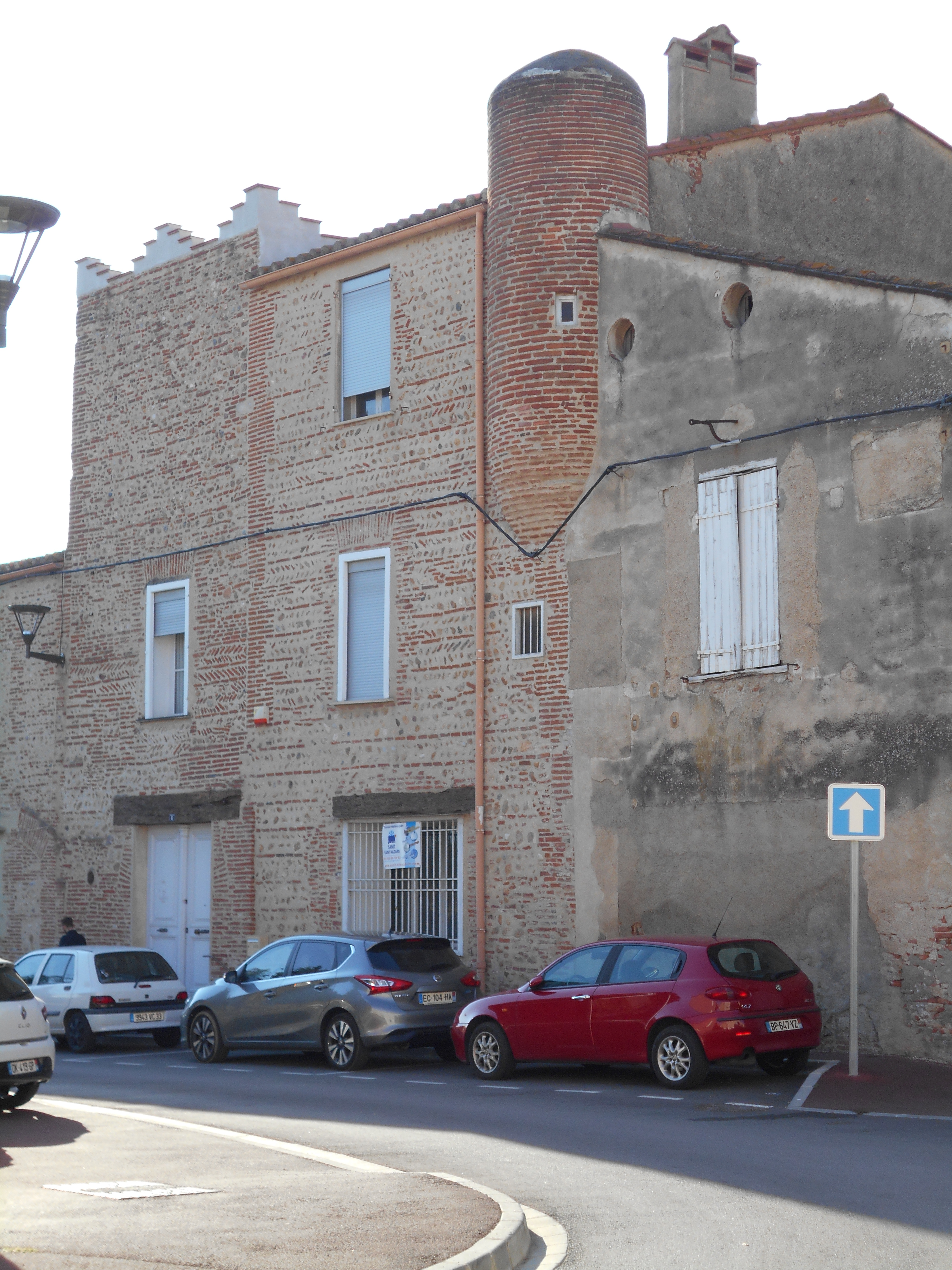 Casa Hortafà, d'Alenyà